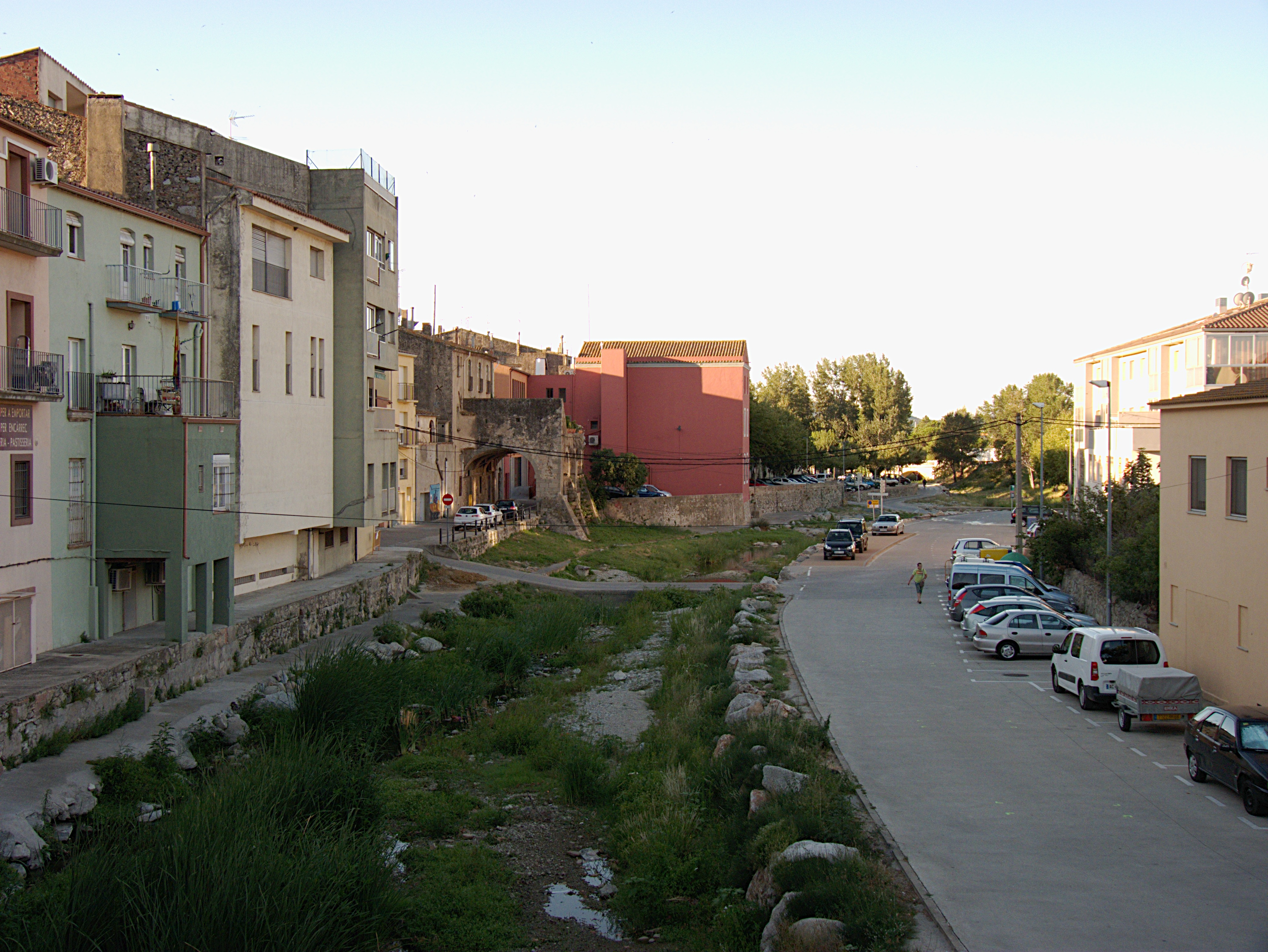 El Llobregat, La Jonquera (Haut-Ampurdan, Gérone, Catalogne, Espagne)